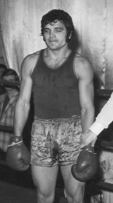 Alec Năstac vs Simion Cuţov in Zalău, 1974